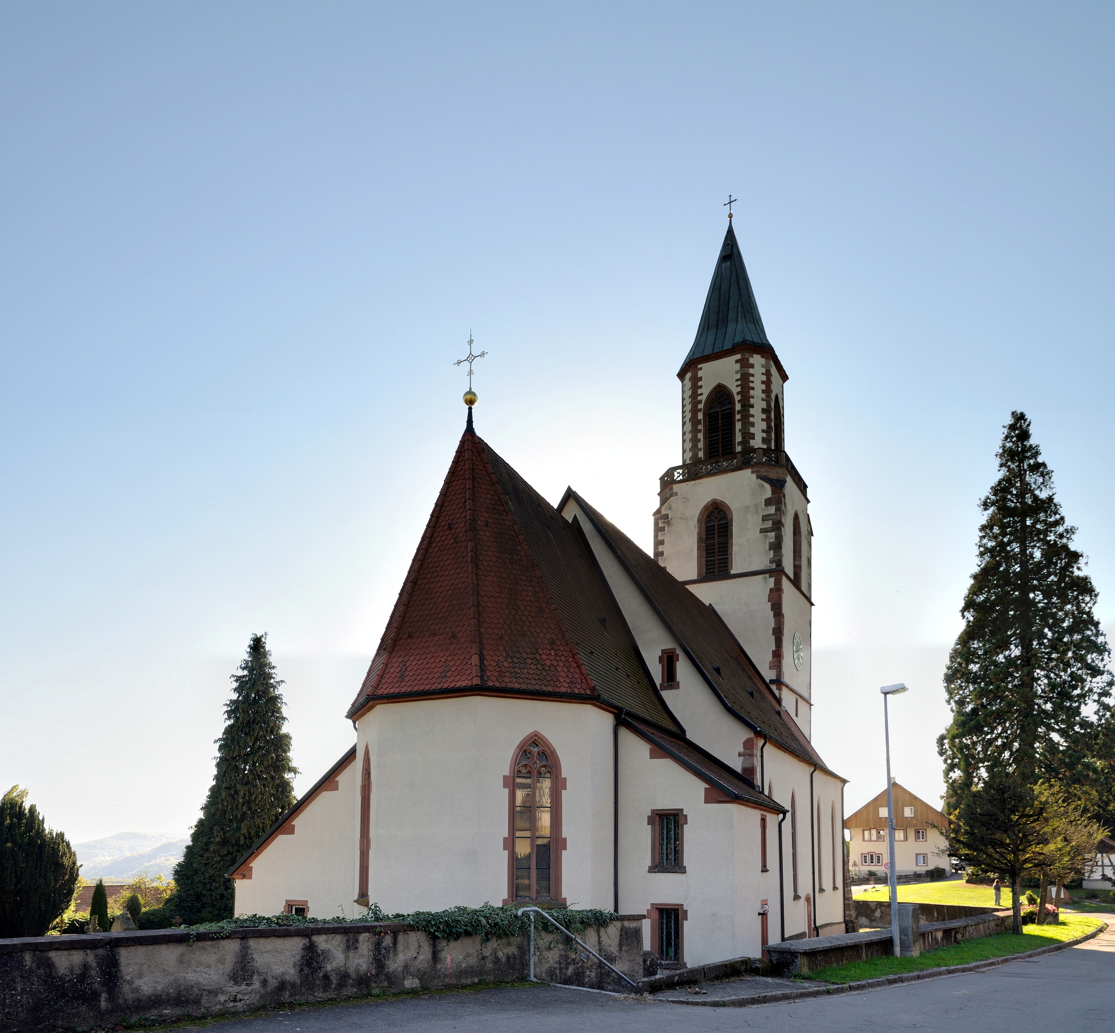 Rheinfelden-Eichsel: St. Gallus, Chorseite